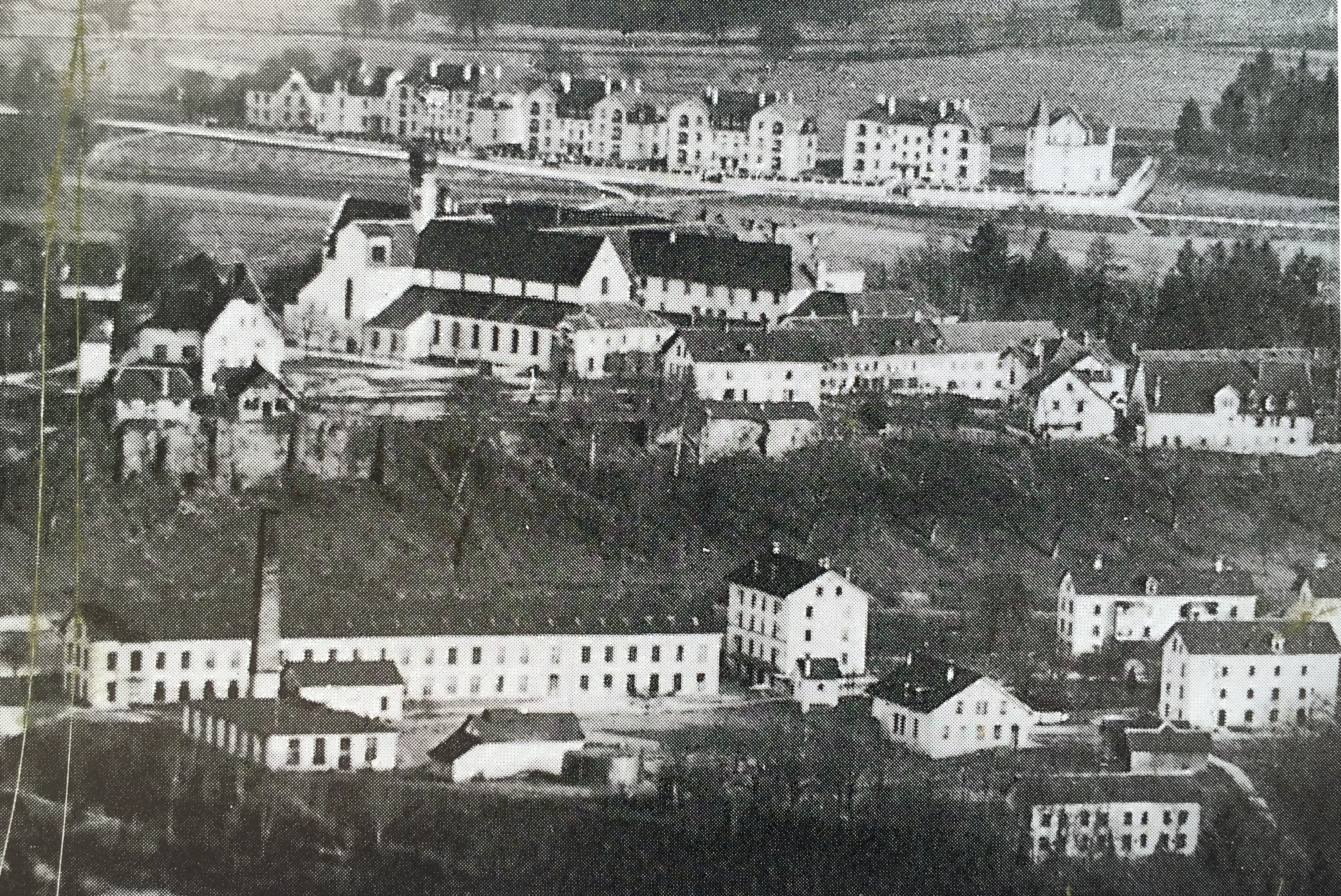 Blick auf die Damsau und das Kloster Wettingen